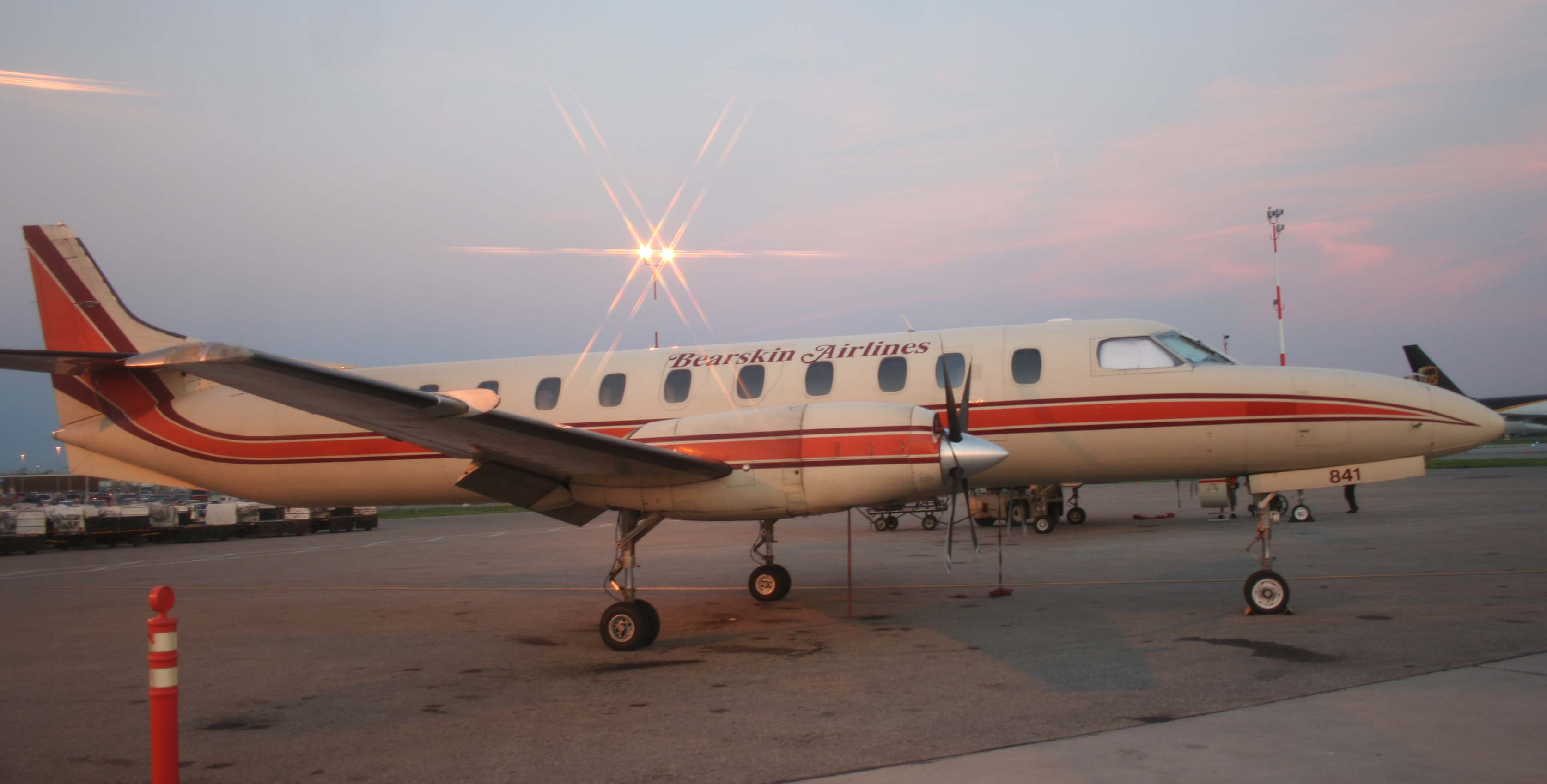 Bearskin Metroliner (C-FXUS) at Winnipeg